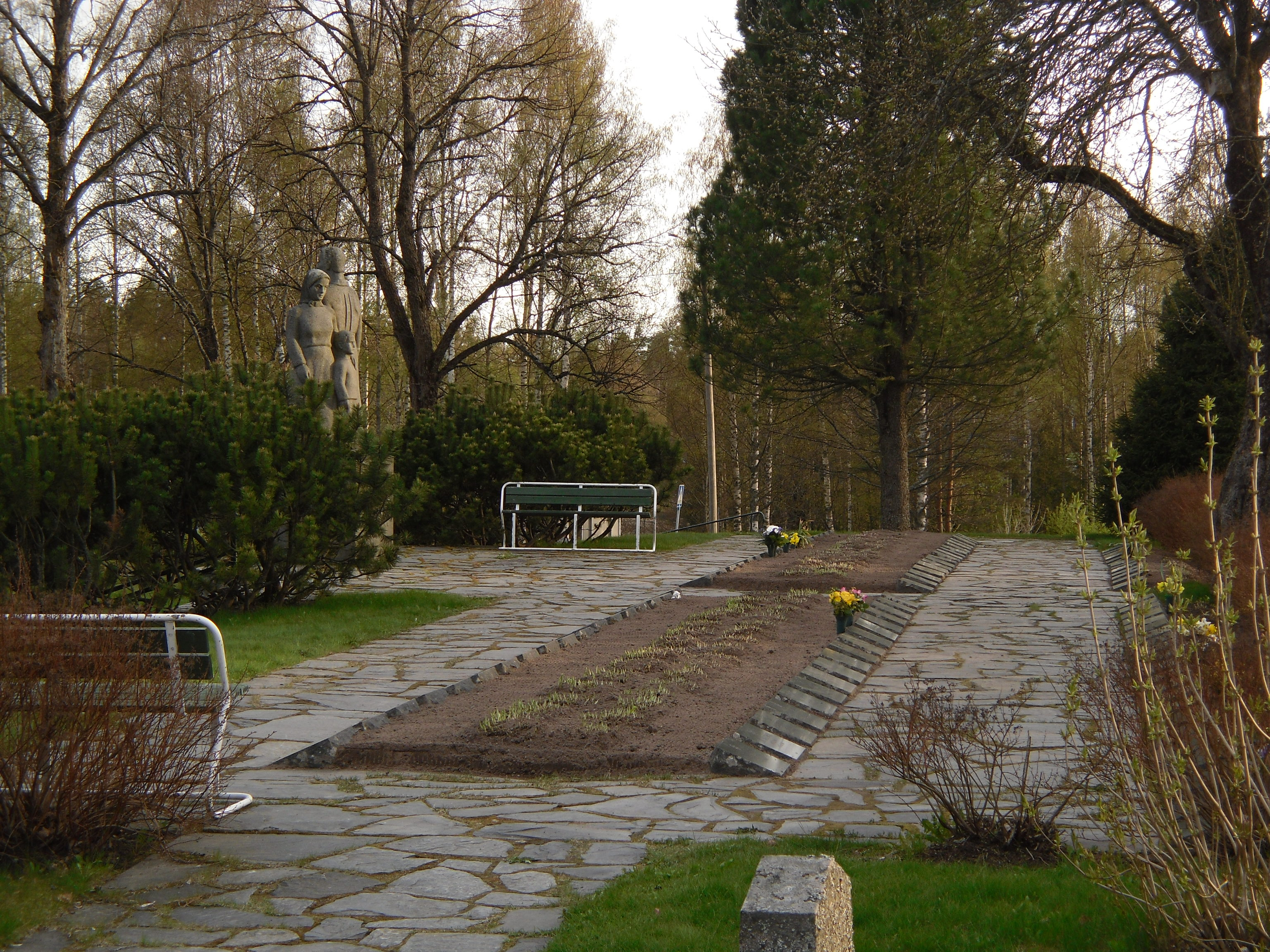 Pomarkun sankarihaudat